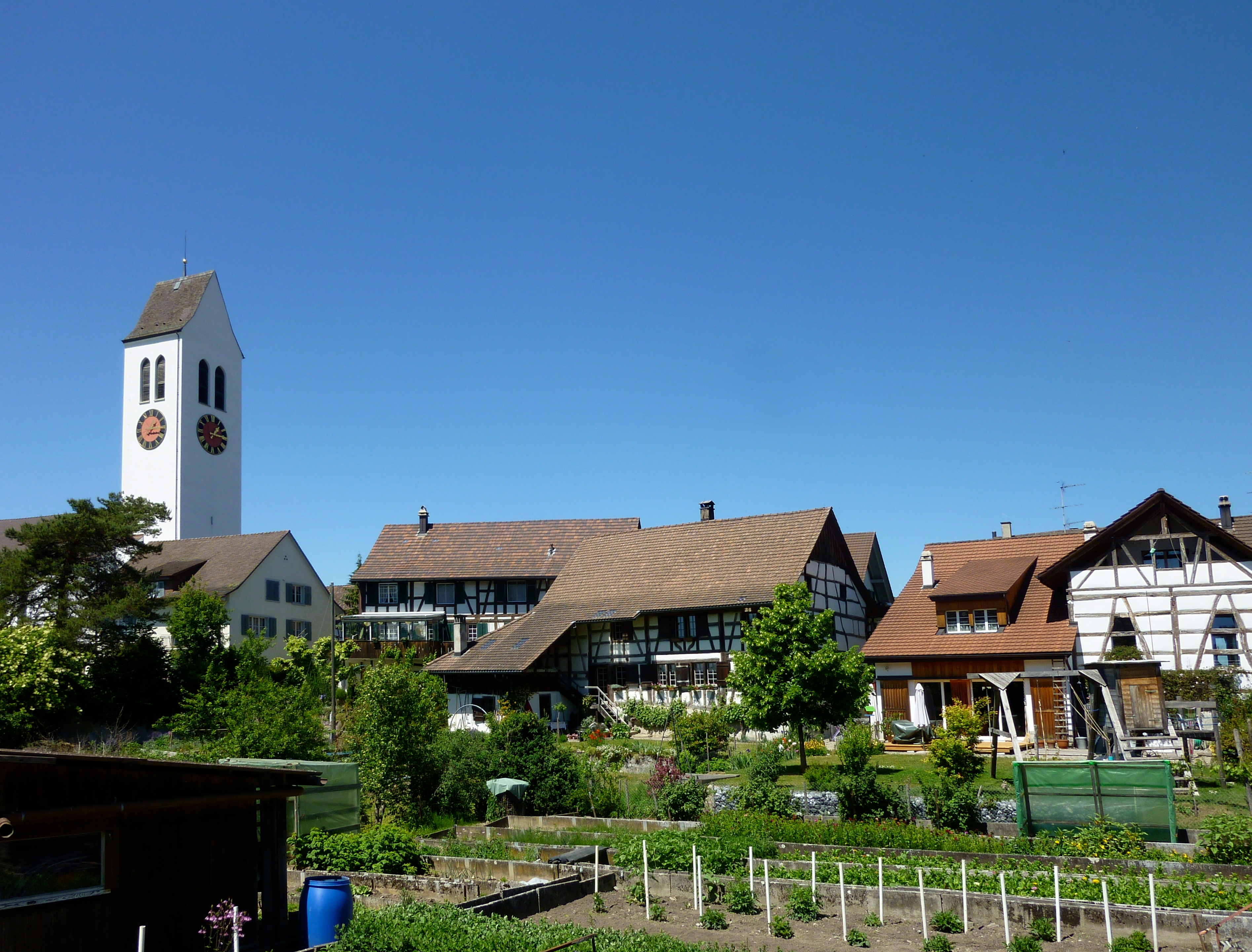 Ossingen Kirche